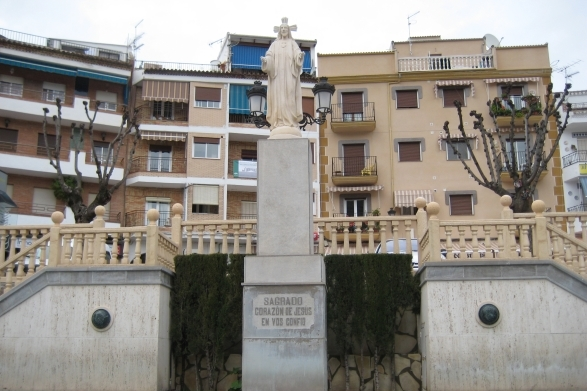 Plaza de España, en la localidad de Algarinejo, provincia de Granada (España)